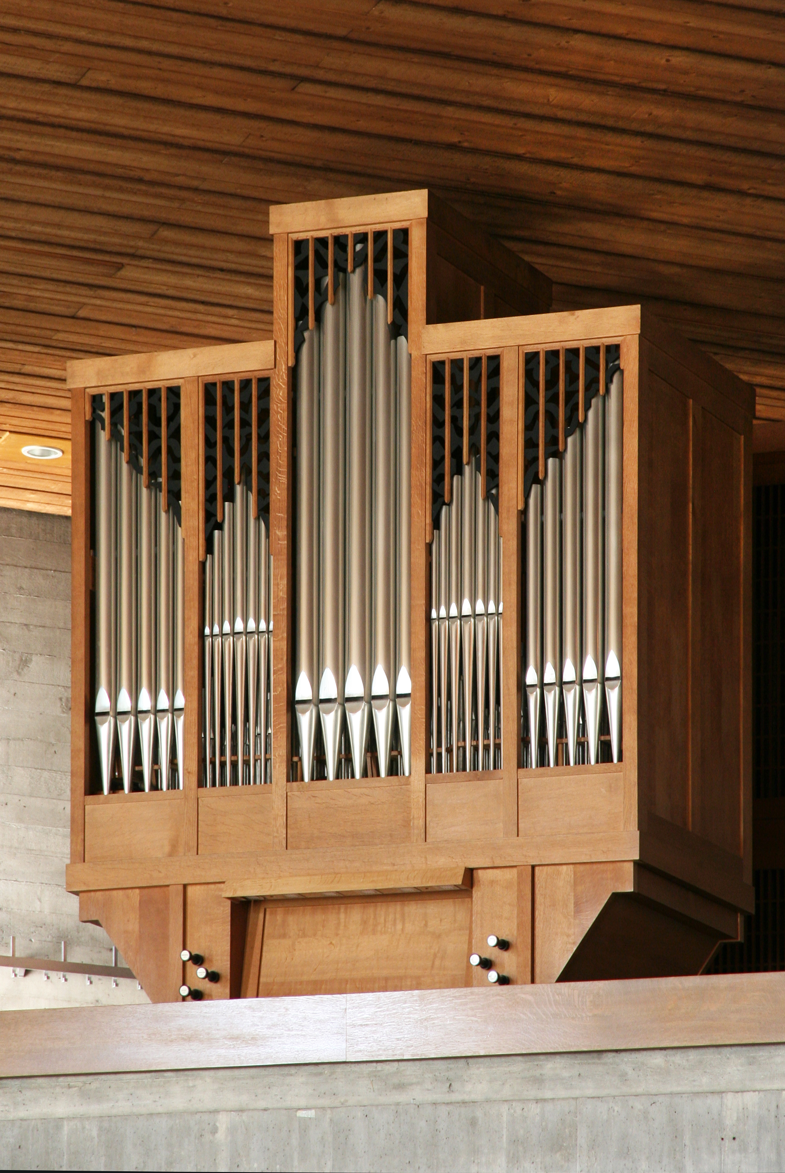 Römisch-katholische Pfarrkirche St. Josef Dietikon, Orgel